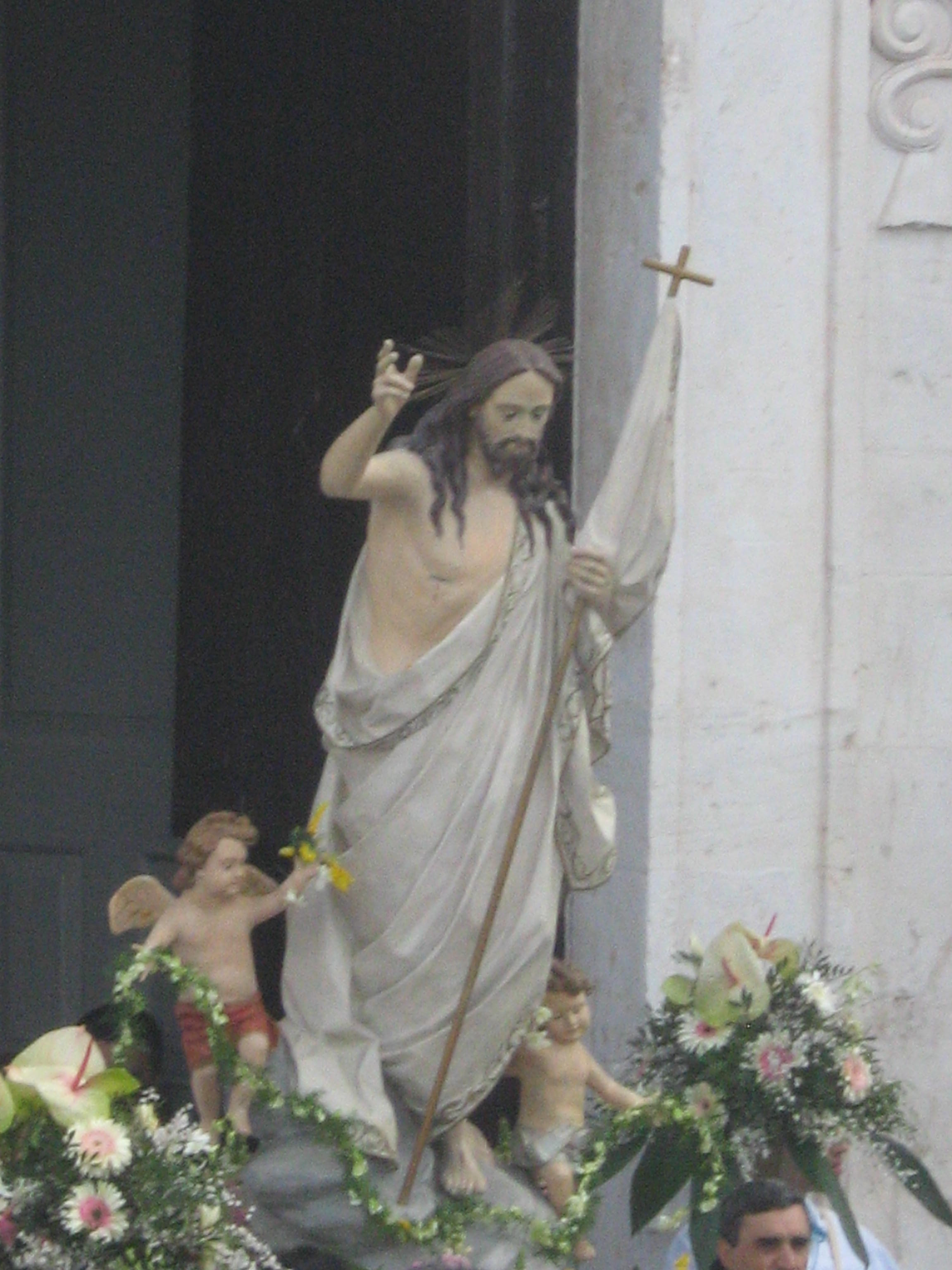 Statua di Gesù Risorto, Ruvo di Puglia